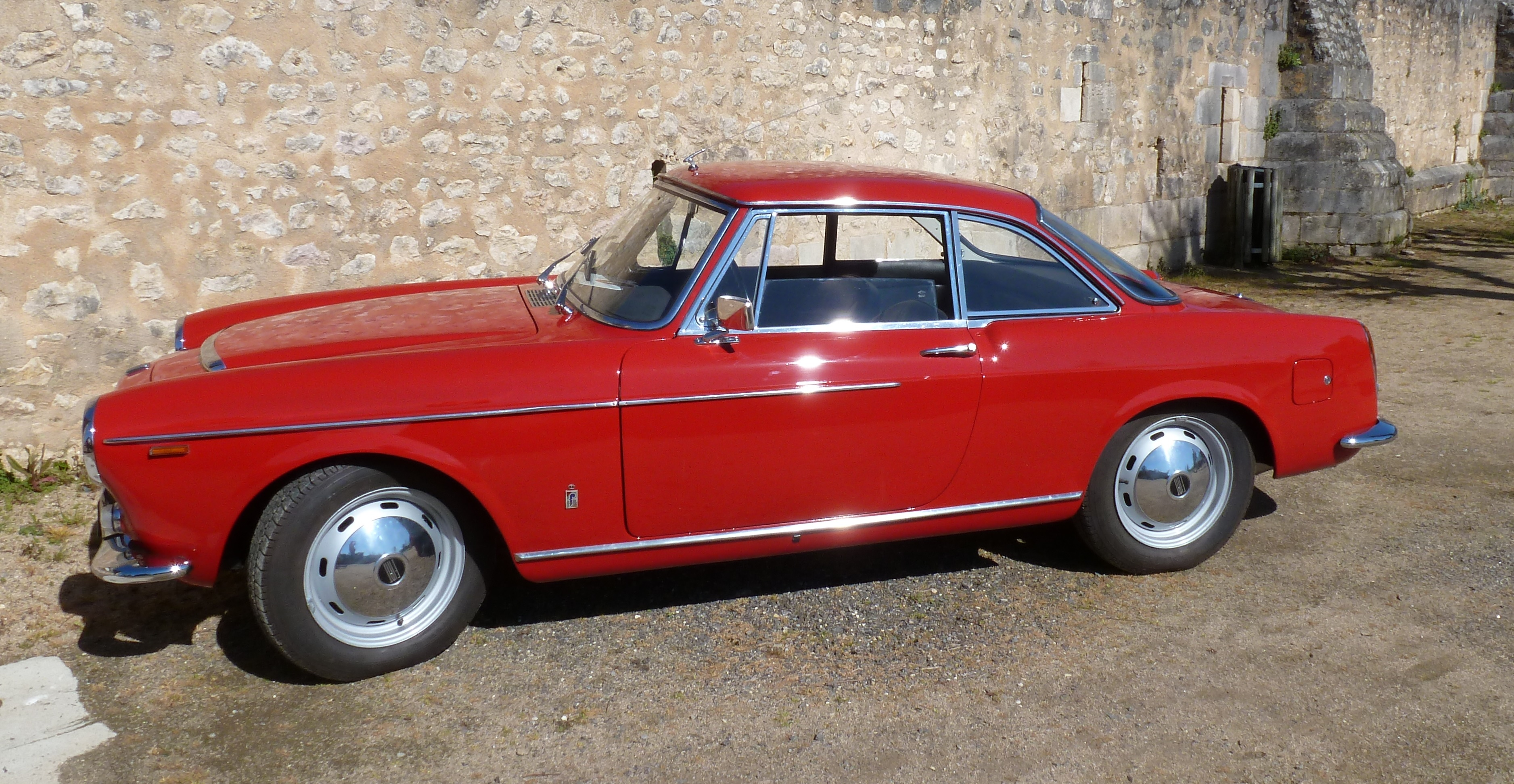 vue latérale du coupé FIAT 1500 S